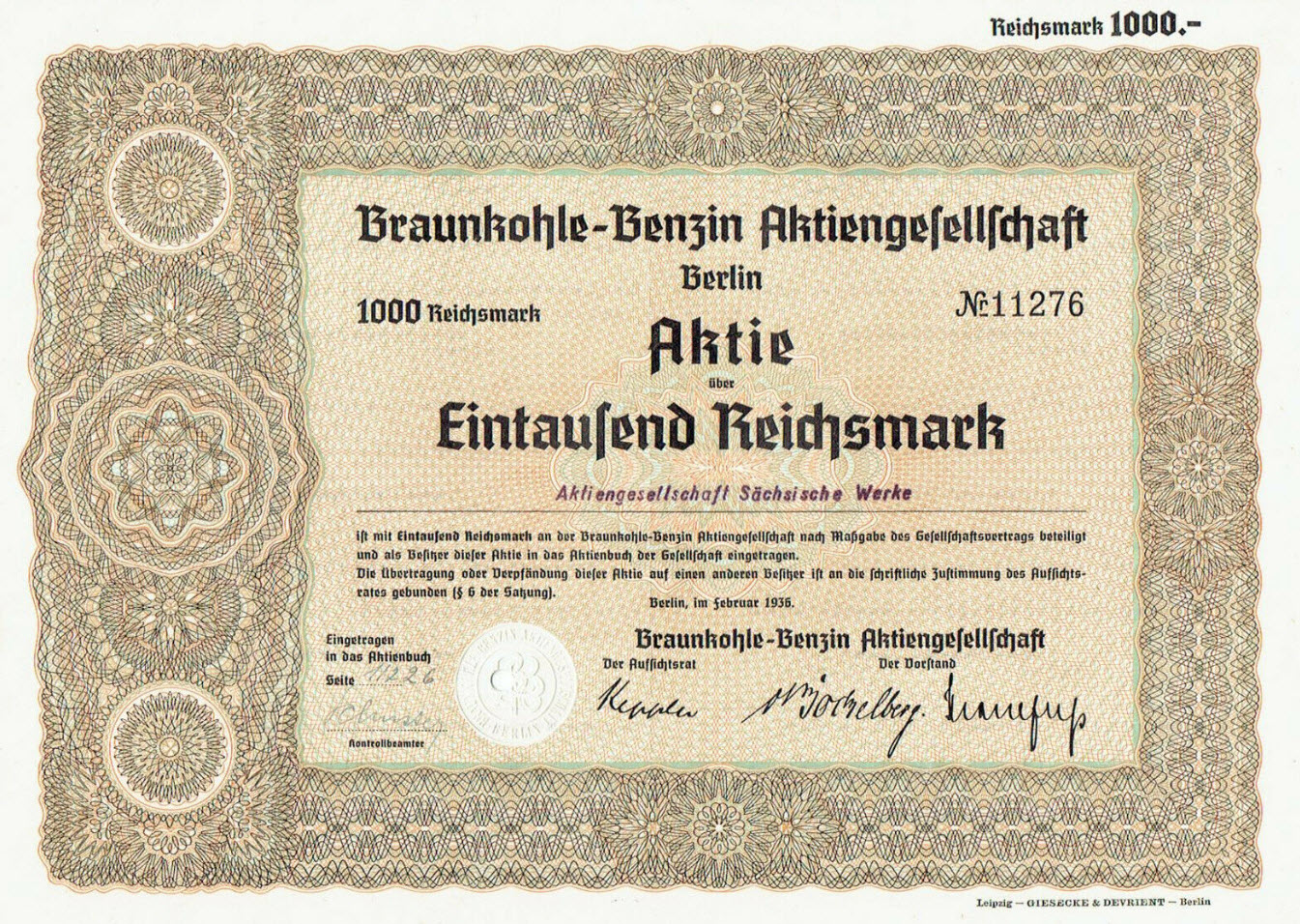 BRABAG-Aktie der Aktiengesellschaft Sächsische Werke